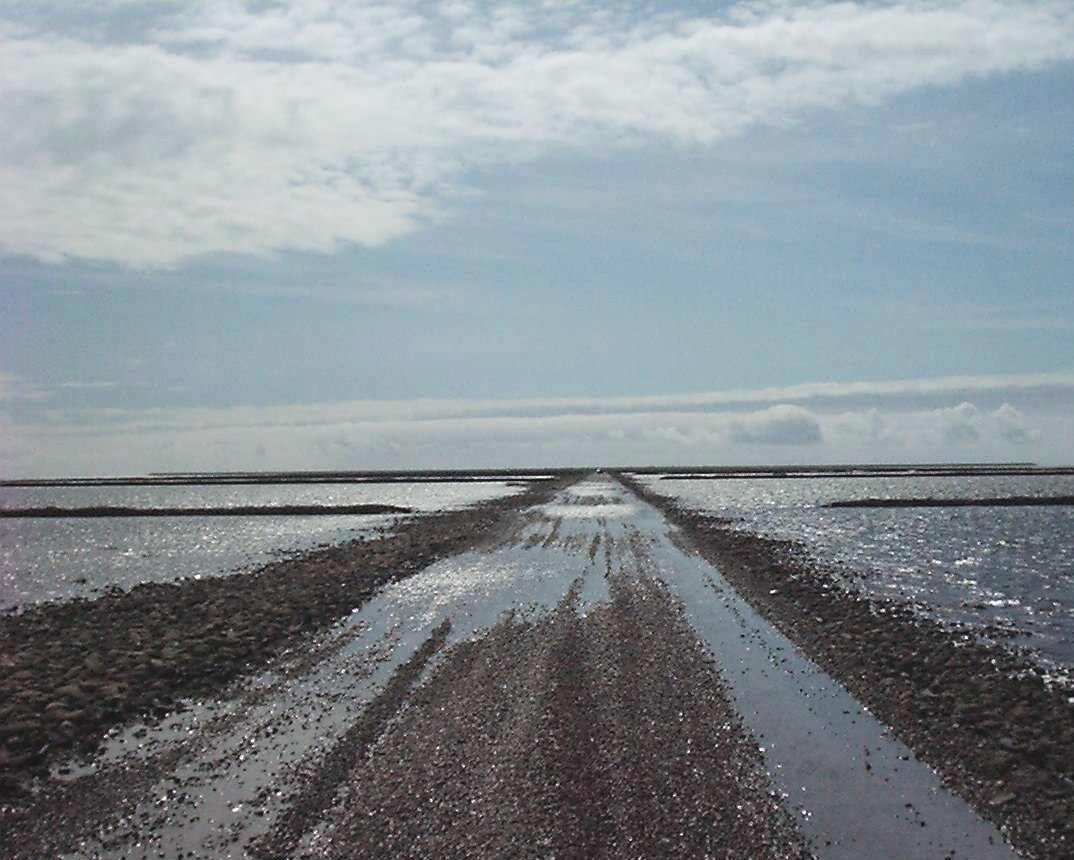 Zu sehen ist der Ebbeweg zur dänischen Insel Mandø im Zeitraum zwischen Flut und Ebbe. Bei Flut steht das Wasser hier bis zu einem Meter hoch, ein passieren ist nicht mehr möglich.